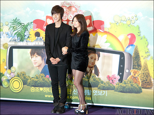 '장난스런 키스' 유튜브 특별판 발표회